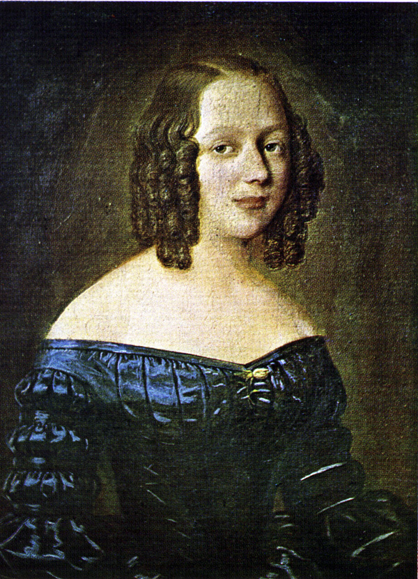 Amalie Sofie Bekkevold, wife of norwegian poet Henrik Wergeland